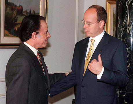 El presidente Carlos Menem se reunió con el príncipe Alberto de Mónaco, quien visita la ciudad de Buenos Aires como miembro del Comité Olímpico Internacional (COI).